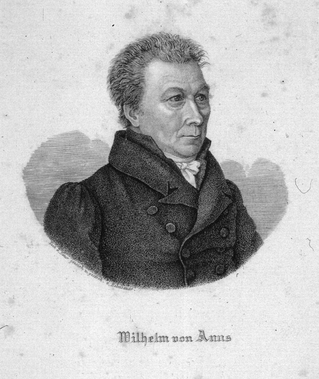 Der Regensburger Kaufmann und Politiker Wilhelm von Anns (1766-1837)